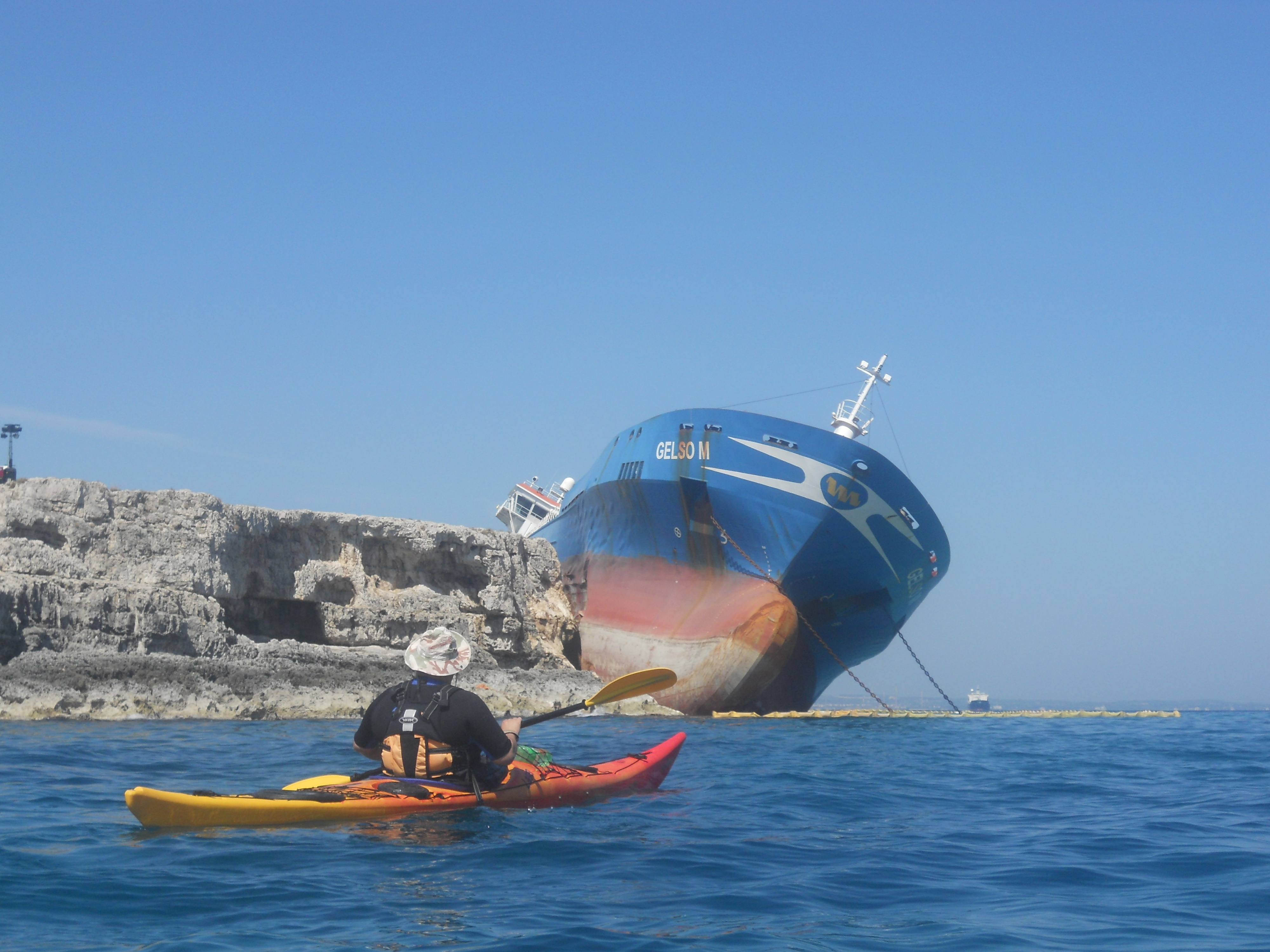 La nave Gelso M naufragata nella rada di Santa Panagia - Siracusa - Sicilia